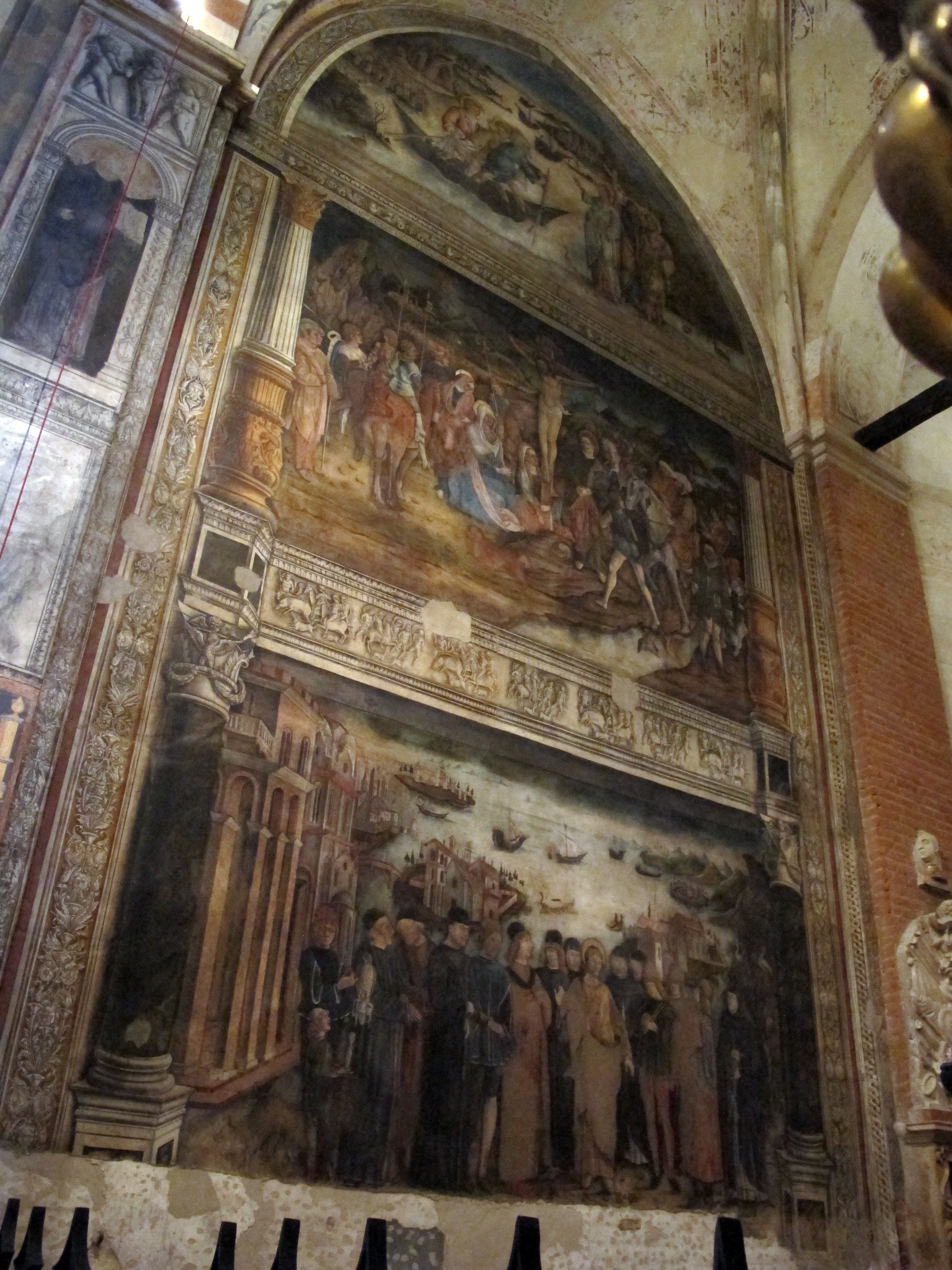 Santa Anastasia (Verona)